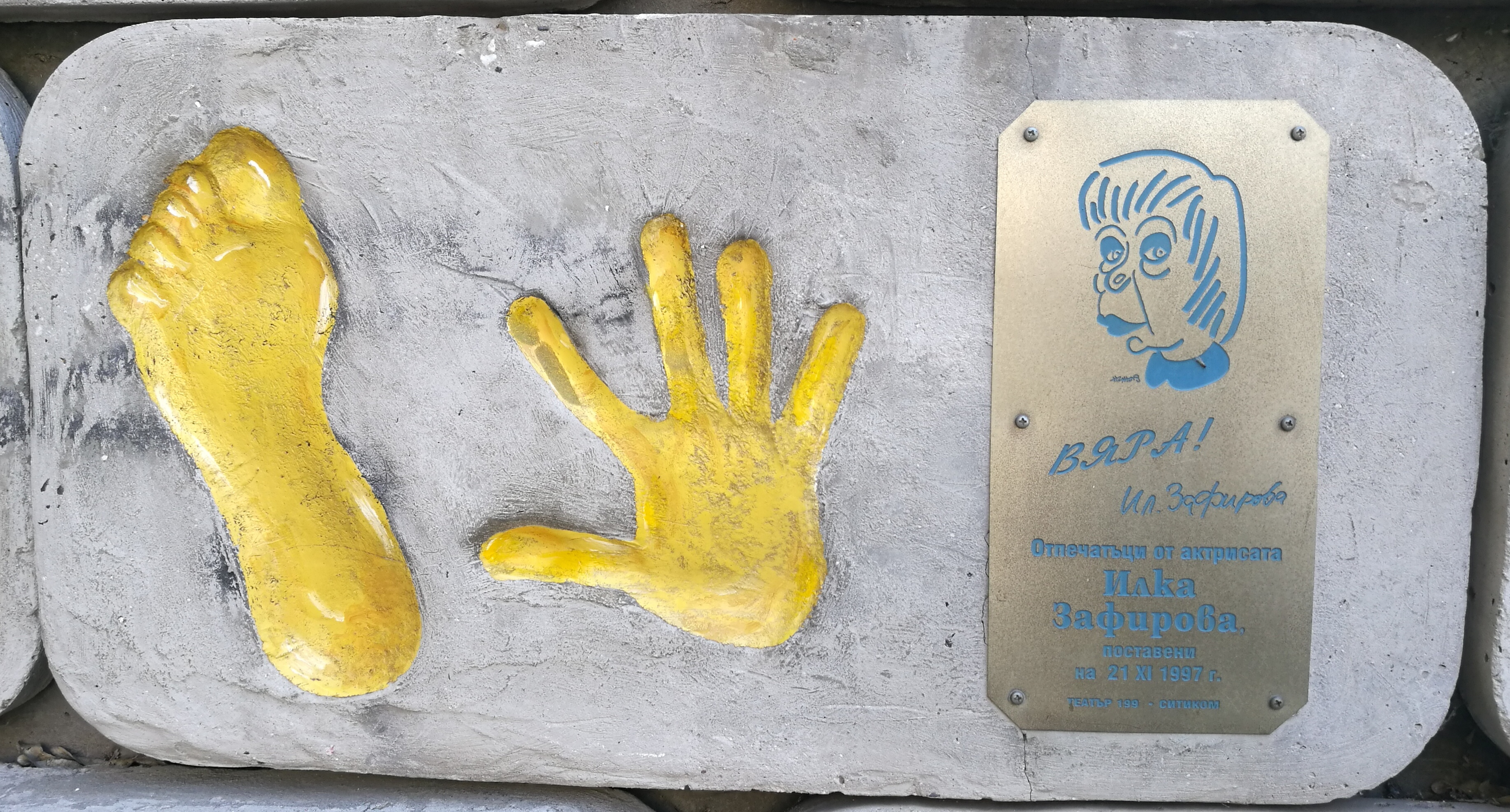 Стената на славата пред Театър 199 - пано с отпечатъци, послание и шарж на Илка Зафирова.